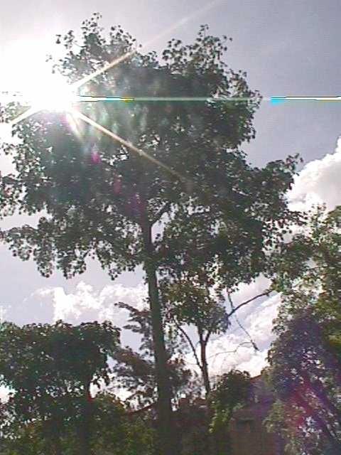 Vegetacion del Hatillo